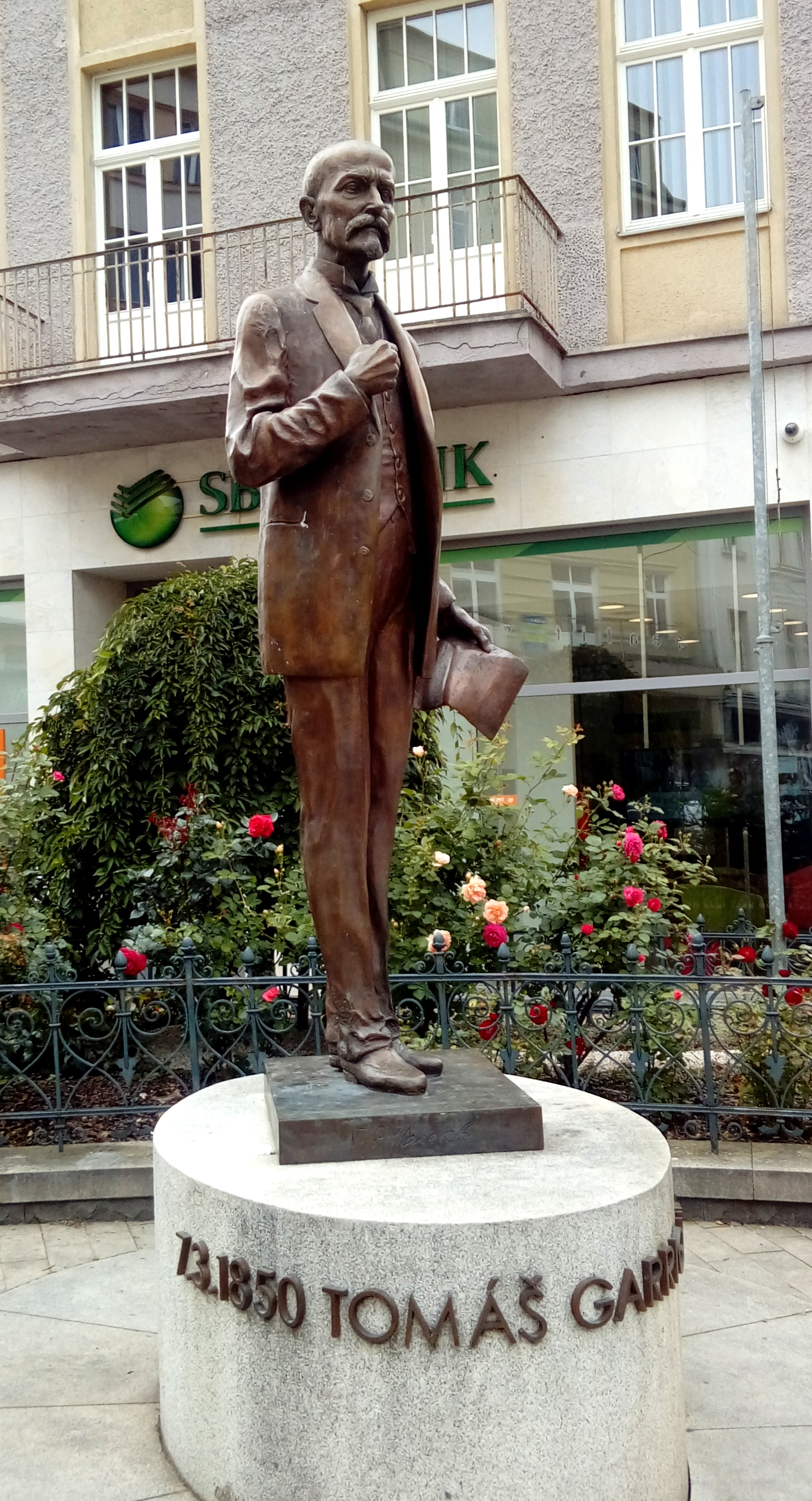 Pomník prvního československého prezidenta Tomáše Garrigua Masaryka z roku 2007 od karlovarského akademického sochaře Jana Kotka na prostranství před Skleněným palácem na nároží ulic T. G. Masaryka a Dr. Davida Bechera uprostřed města.